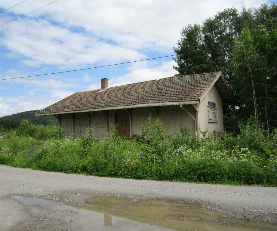 Brandval stasjon på Solørbanen